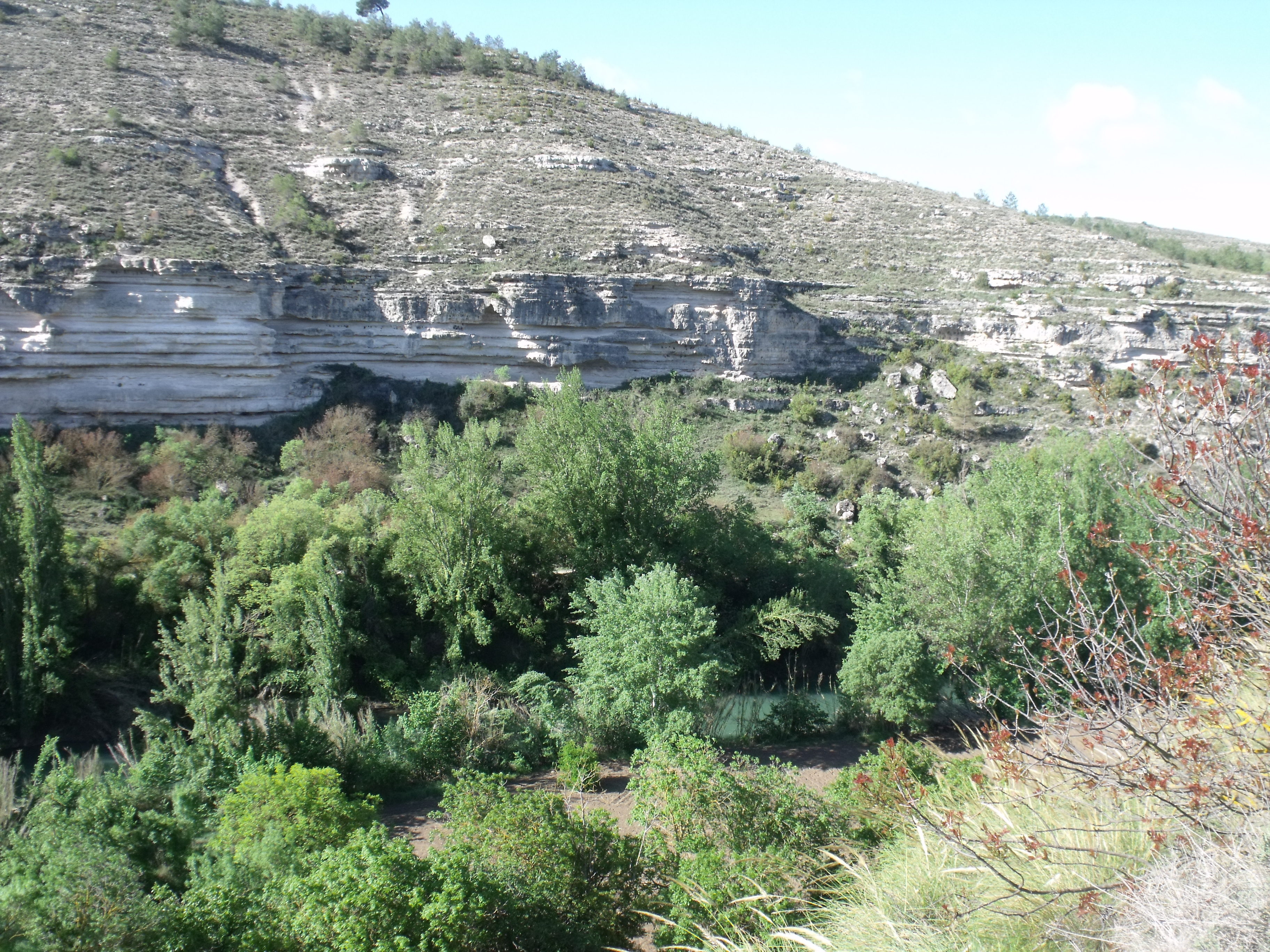 Paisaje de la zona